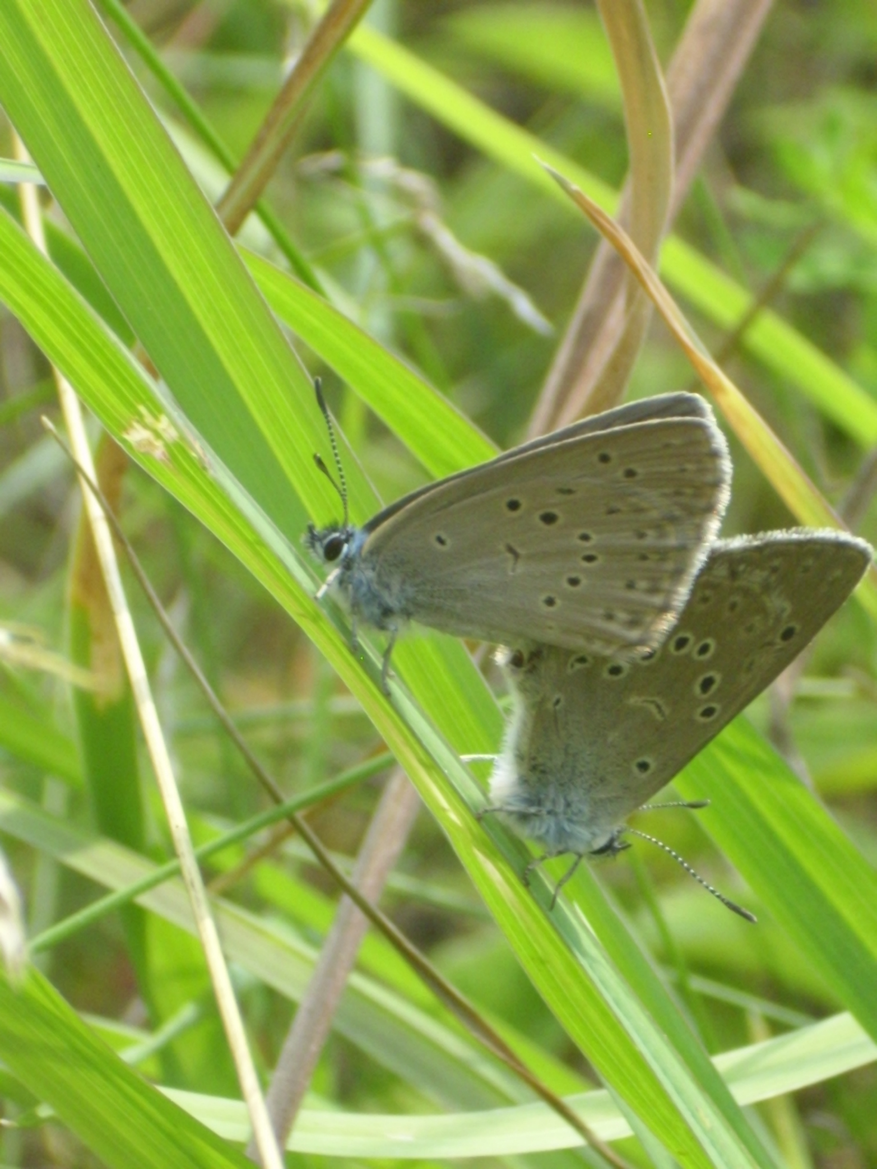 pářící se jedinci Modráska hořcového Rebelova (Maculinea alcon rebeli), Přírodní park Rymáň, 1.7.2011,BenqDC C640, Kytičková Pavlínka